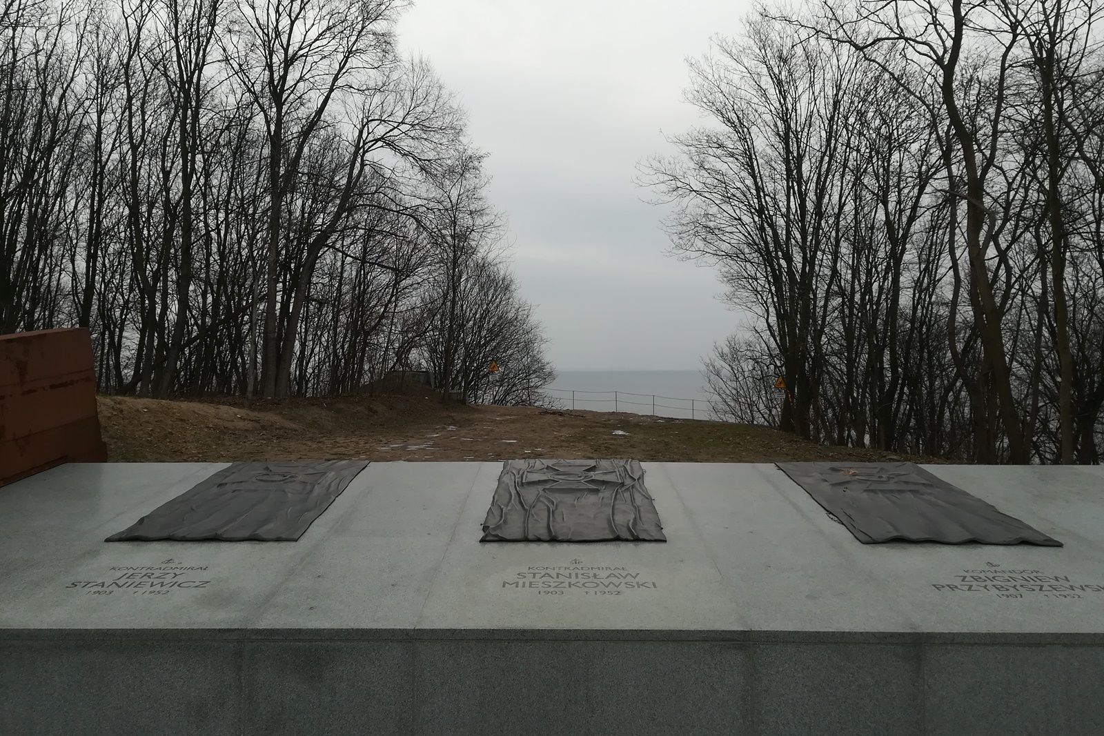 Cmentarz Marynarki Wojennej_Kwatera Pamięci_06